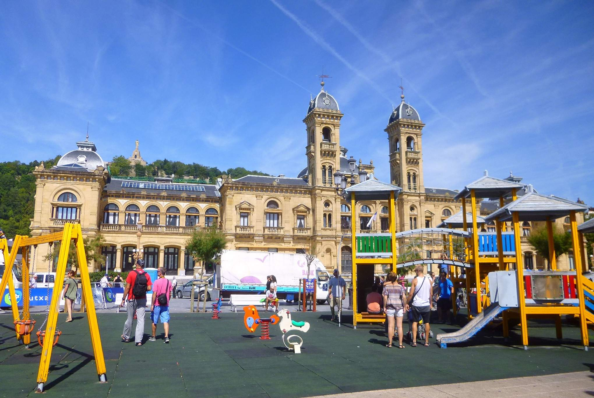 Jardines de Alderdi Eder (San Sebastián)